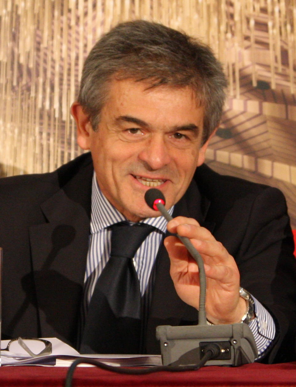 Dettaglio della fotografia di Sergio Chiamparino durante la Conferenza Stampa MITO SettembreMusica 2008 - Foyer Teatro Regio, Torino